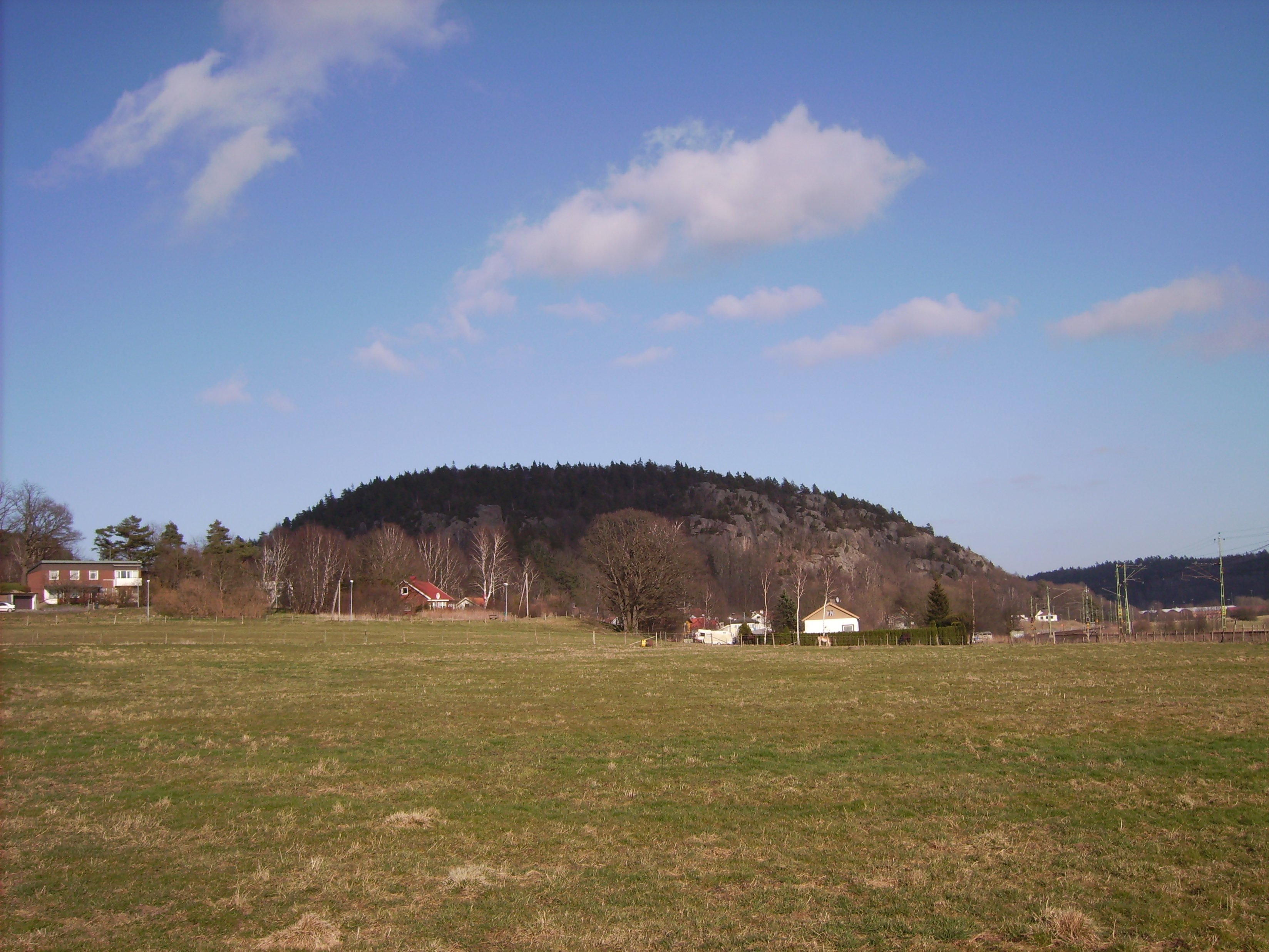 Bilden är fotograferad av Harri Blomberg. Photo by Harri Blomberg.